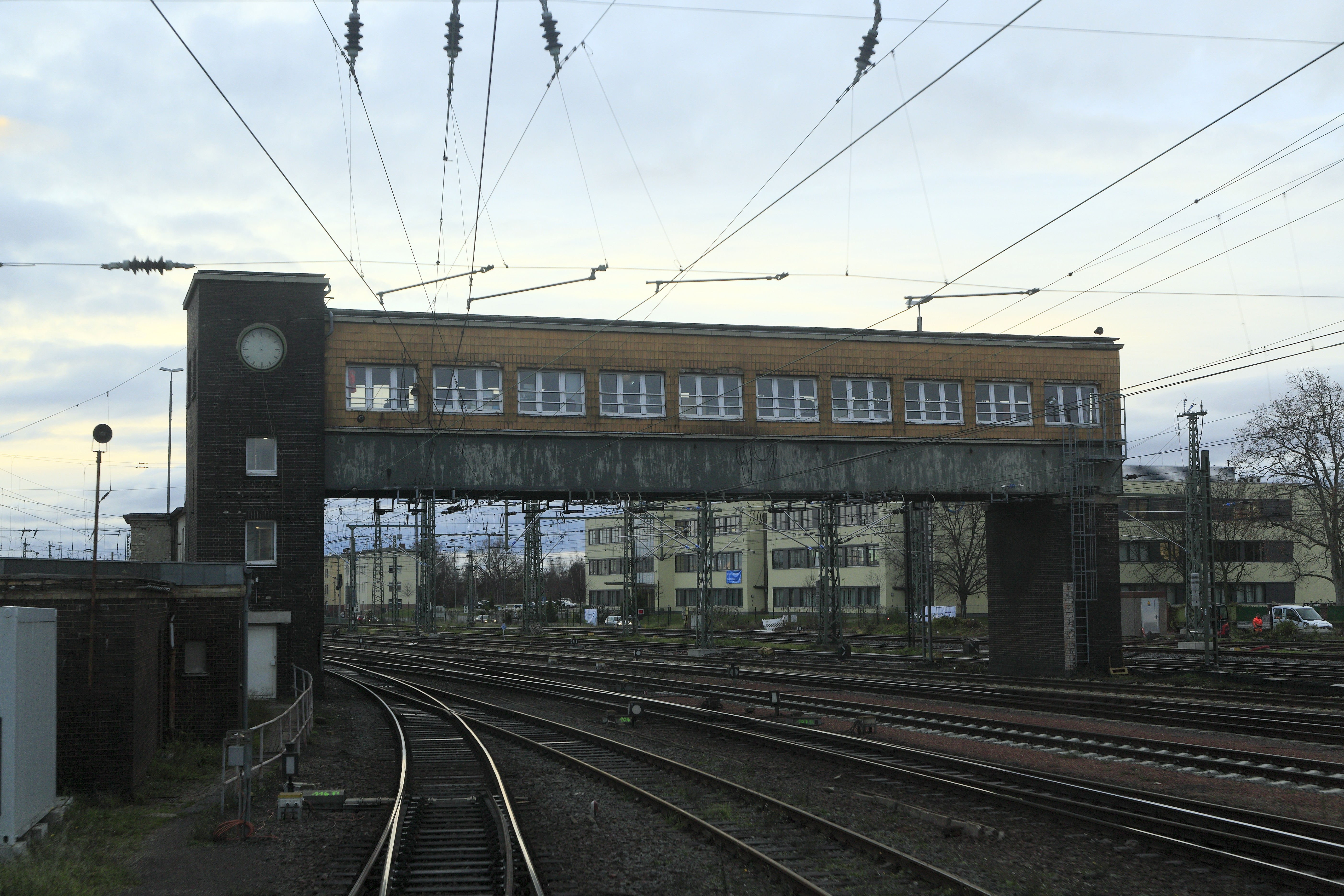 Befehlsstellwerk auf der Südseite des Bahnhofes Halle (S) Hbf, ein elektromechanisches Stellwerk der Bauform 1912.Das Stellwerk wurde im Mai 2017 abgebrochen.